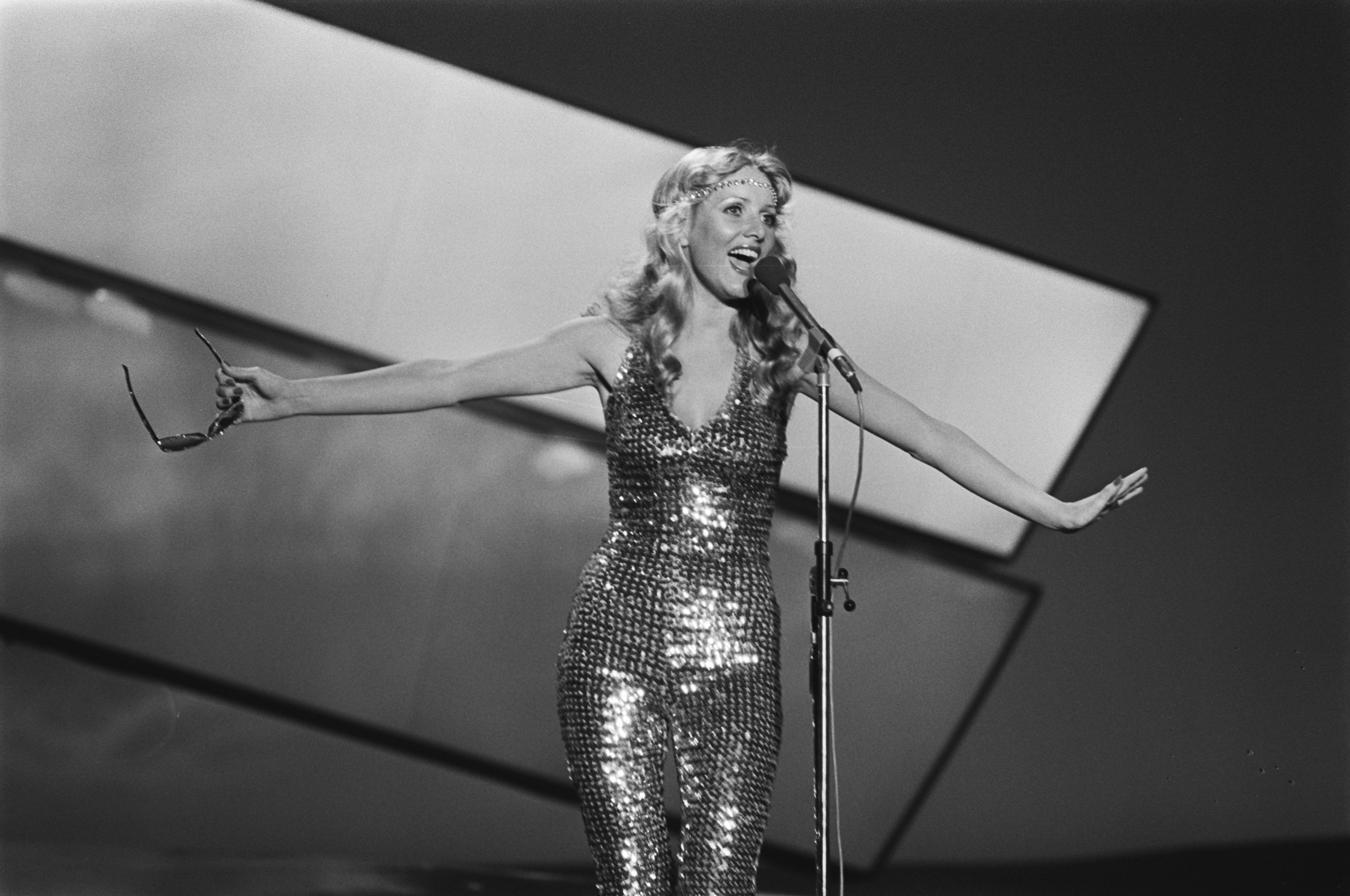 Collectie / Archief : Fotocollectie Anefo Reportage / Serie : [ onbekend ] Beschrijving : Eurovisie Songfestival 76 Den Haag ; Anne Karine Strom (Noorwegen) Datum : 3 april 1976 Locatie : Den Haag, Noorwegen Trefwoorden : songfestivals Persoonsnaam : Eurovisie Songfestival Fotograaf : Mieremet, Rob / Anefo Auteursrechthebbende : Nationaal Archief Materiaalsoort : Negatief (zwart/wit) Nummer archiefinventaris : bekijk toegang 2.24.01.05 Bestanddeelnummer : 928-5026